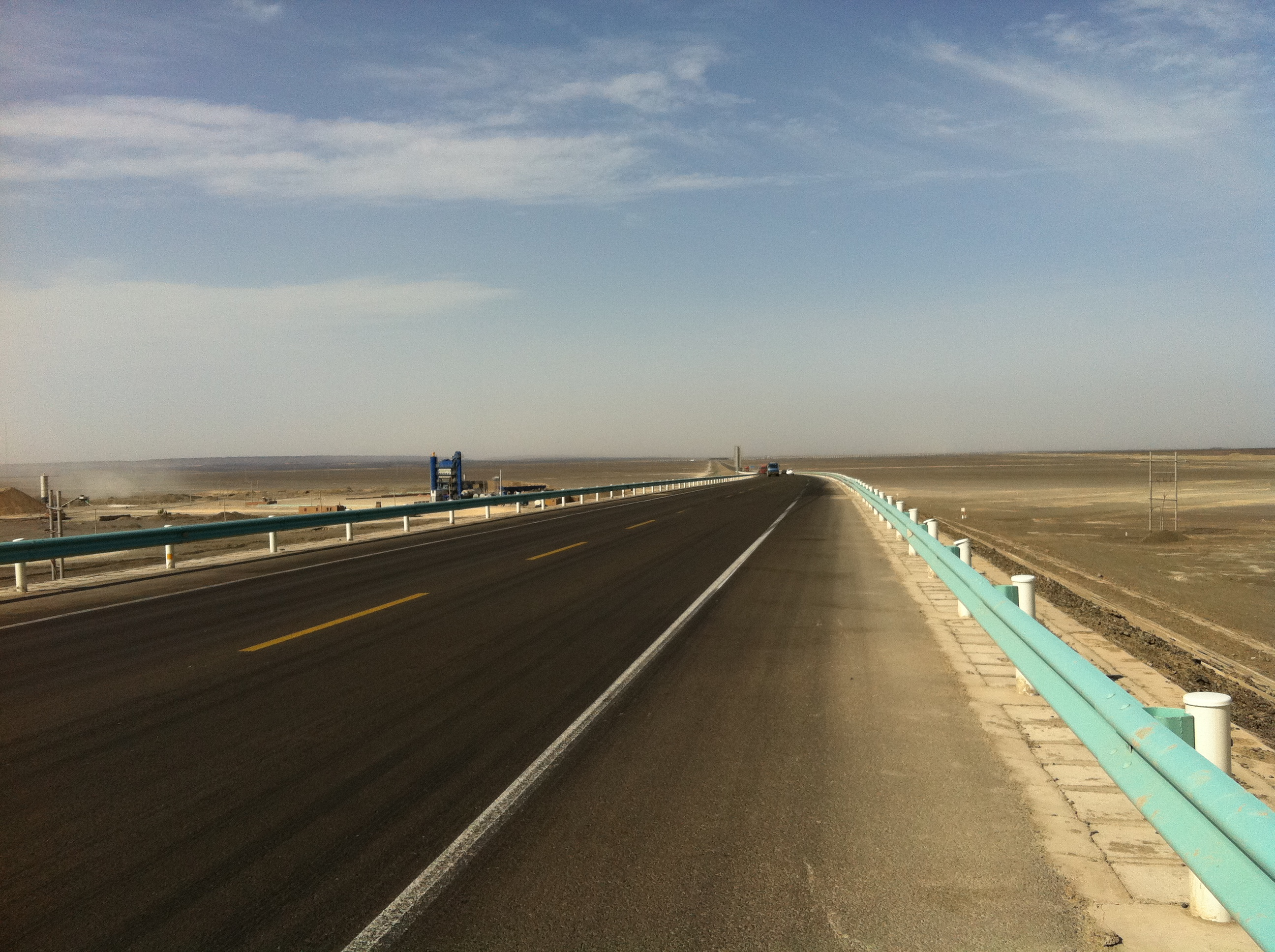 Highway G30 Xinjiang, China